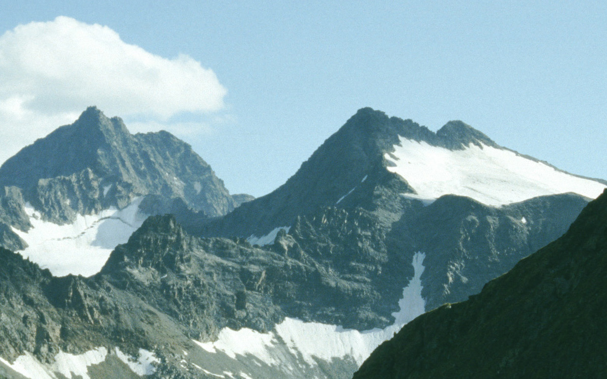 Wilde Leck (left) and Kuhscheibe (right) from North, from Niederen Sulzkogel